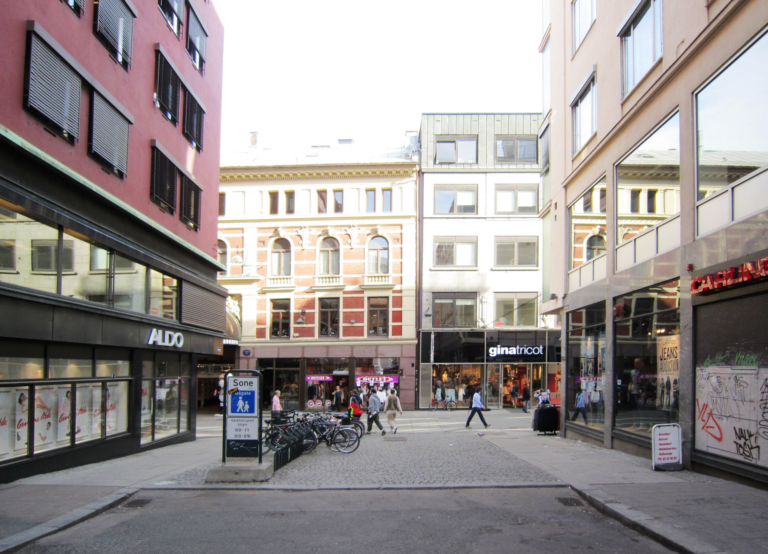 Skråninga i Oslo sentrum (enden mot Torggata)